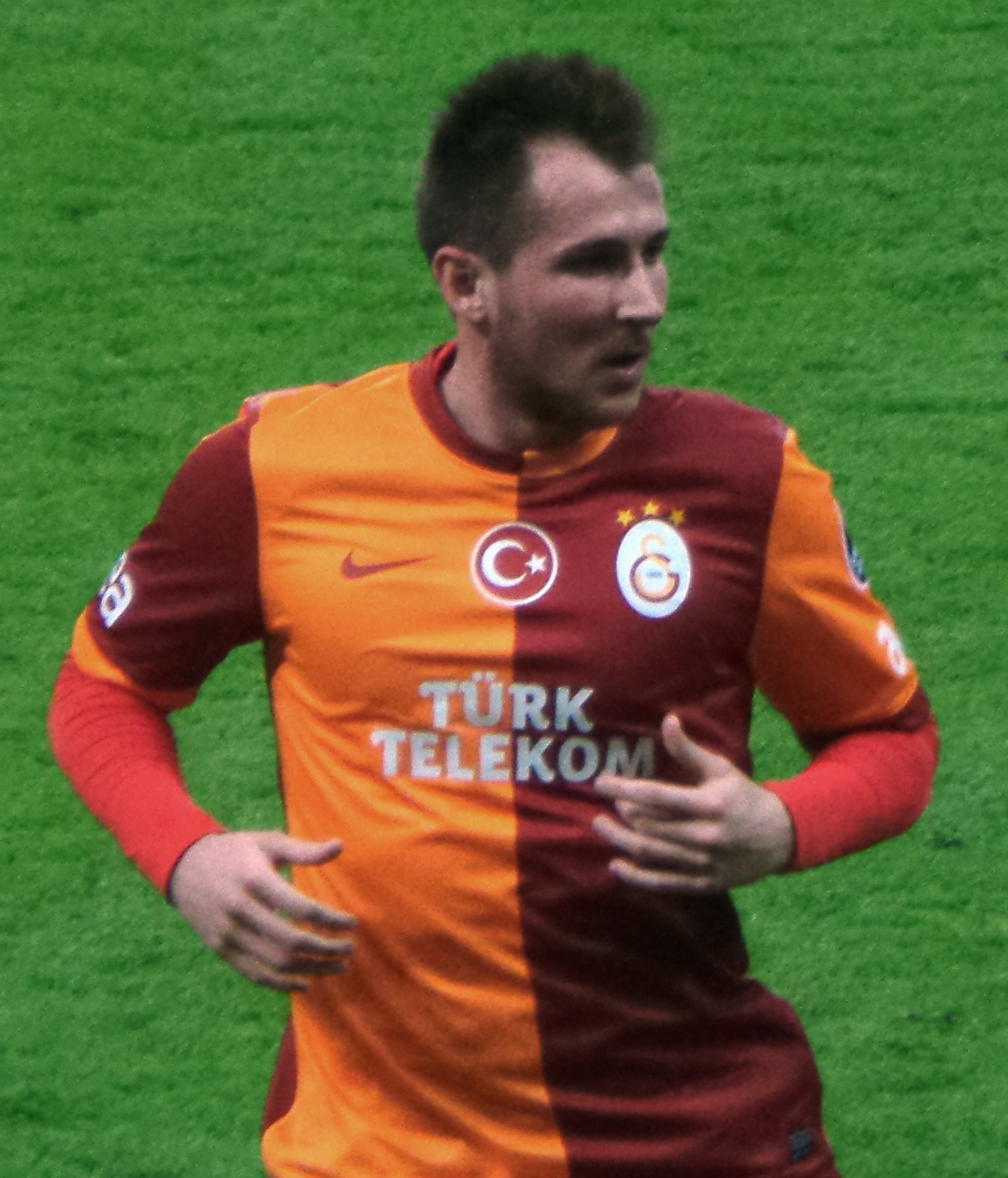 Izet Hajrović at his first official match